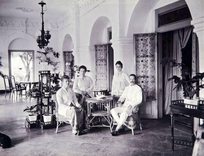 Foto. De heer en mevrouw Pietermaat met de dames Boes Lutjens op de voorgalerij van de administrateurswoning van de suikeronderneming Kalibagor.